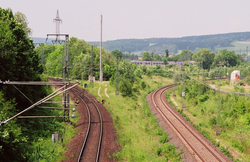 Gleisdreick am Nordostende von Eichenberg, Hessen - Railway Triangel at Eichenberg, Hesse, Germany (Blick aus Richtung Arenshausen nach Westen, rechts die Eichenberger Kurve)